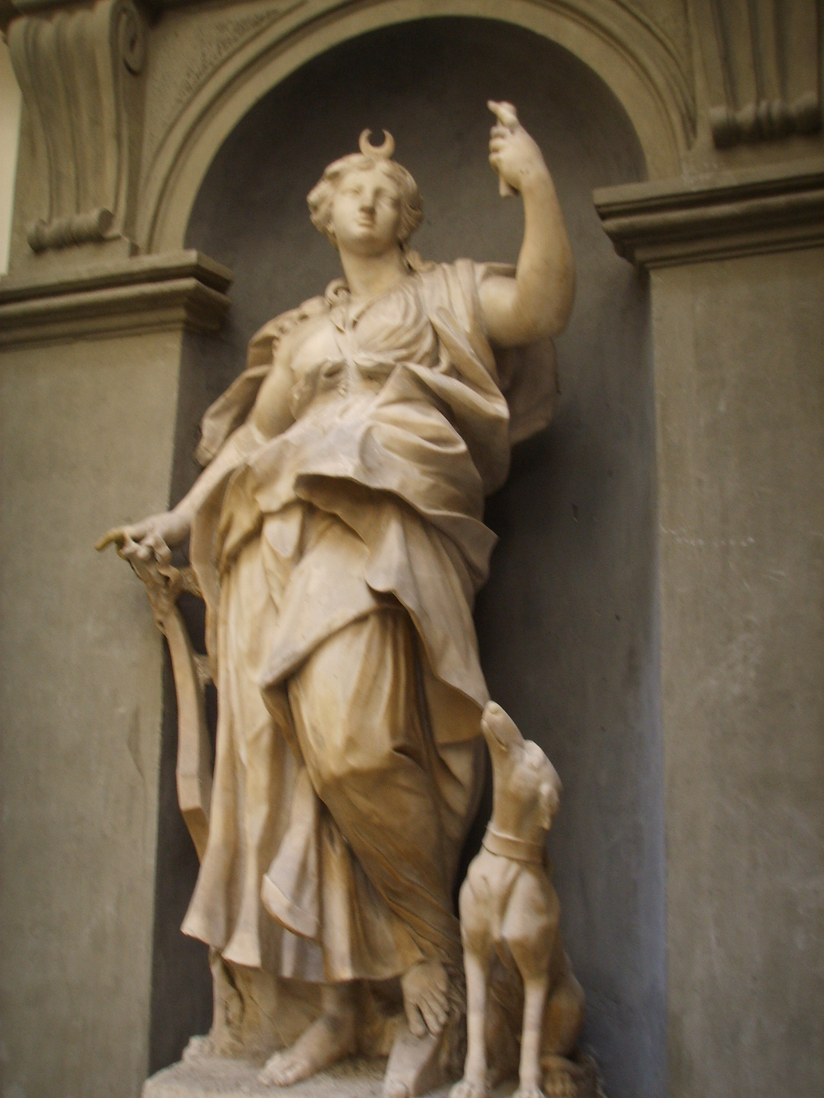 Palazzo tolomei biffi, Diana cacciatrice col cane, giovanni baratta, c. 1690